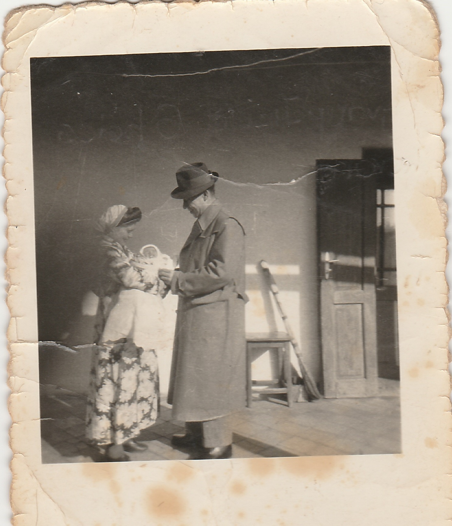 A képen Ujvári László és felesége Borsodi Ilona látható 1956. október 20-án (?). Hathetes gyermeküket tartják (Imre Kálmán)